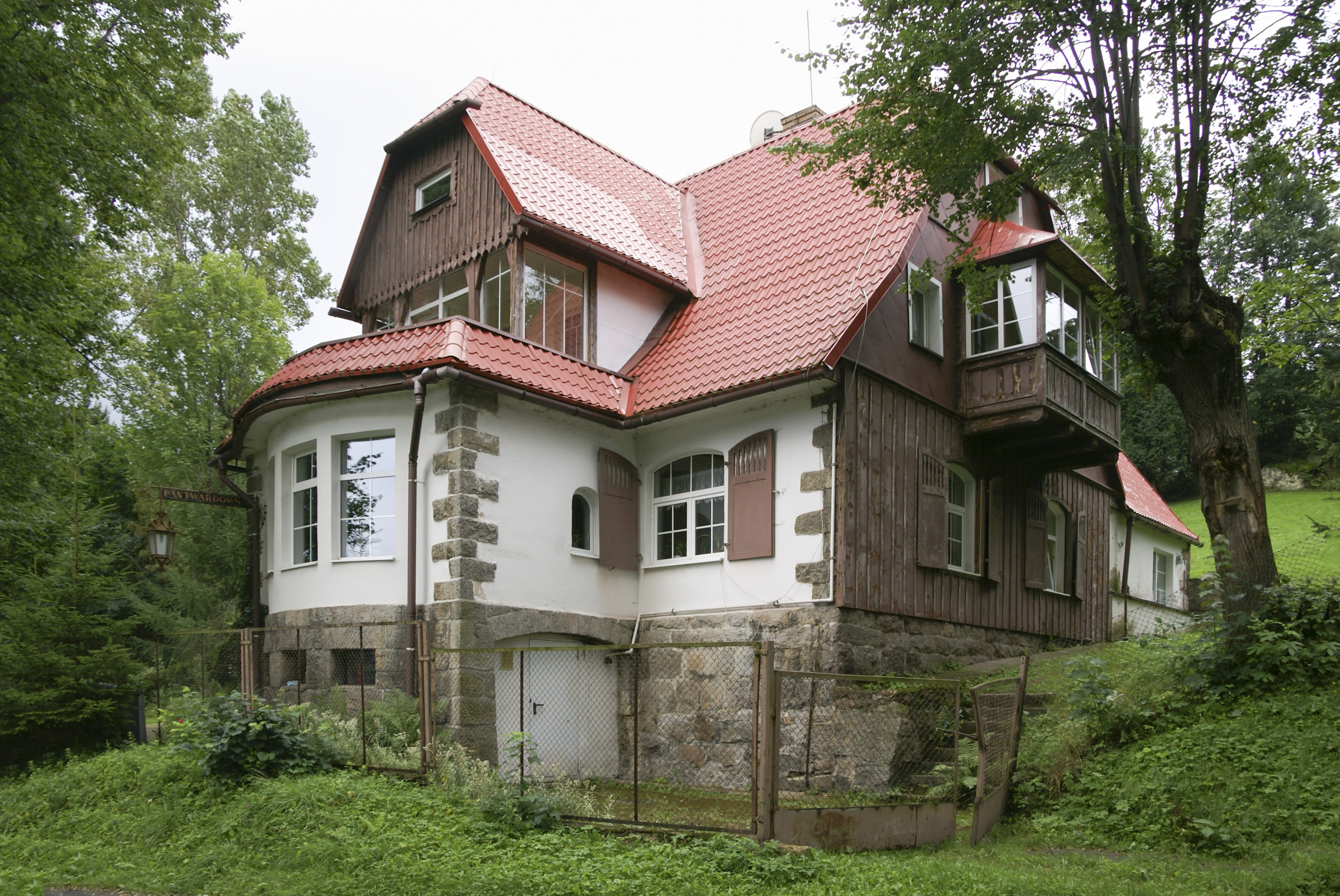 Zachełmie (województwo dolnośląskie) - dom kompozytora Ludomira Różyckiego (1883-1953), w którym mieszkał i tworzył w ostatnich latach życia.